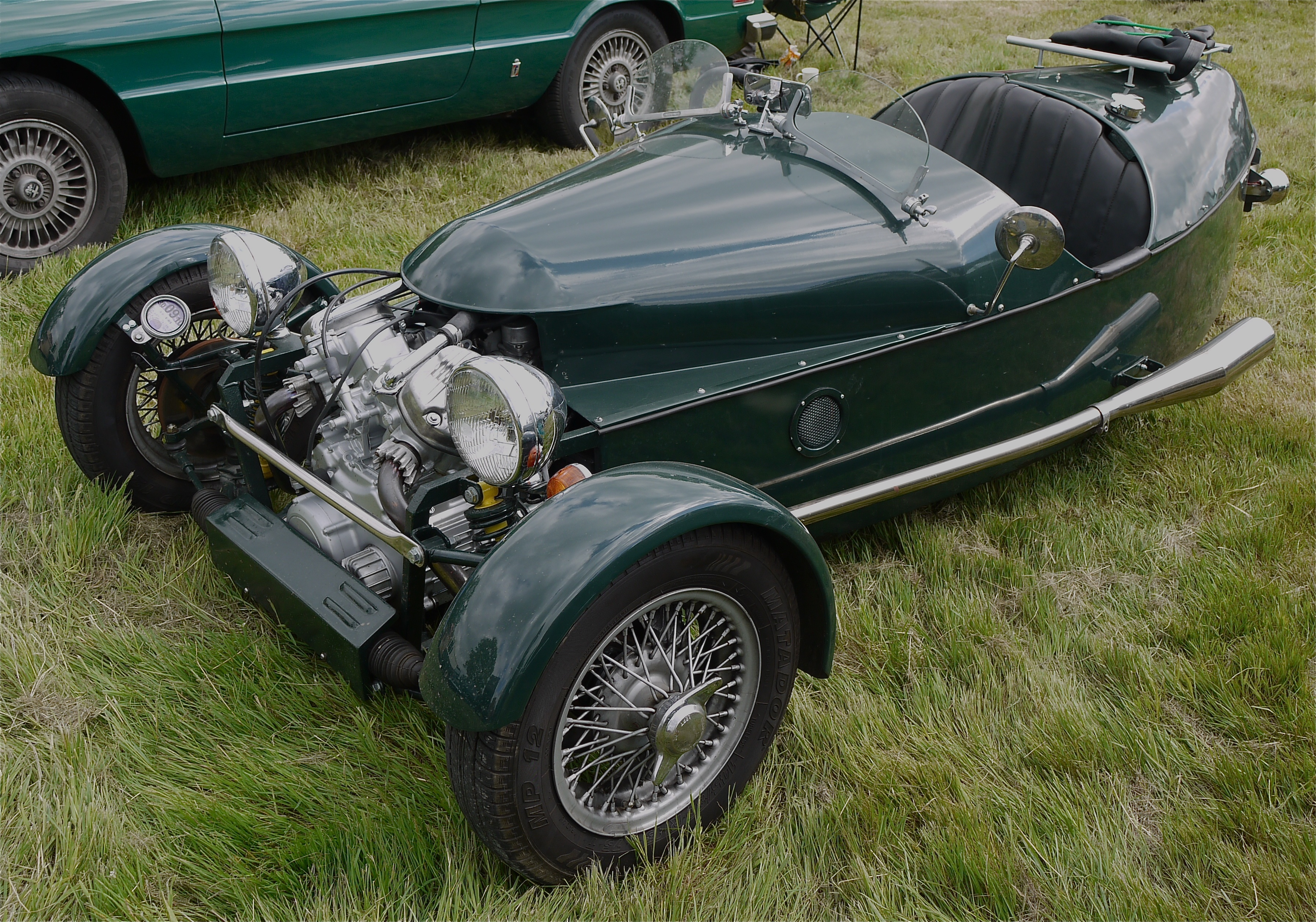 Panasonic G1 14-45 Lens